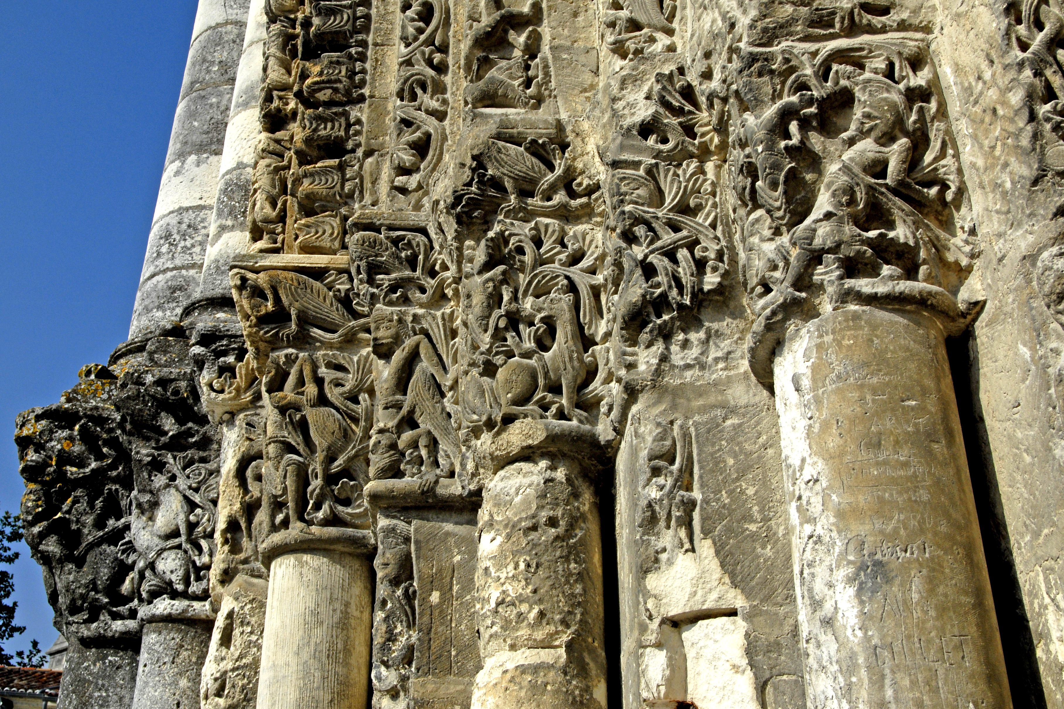 Abbaye aux Dames Saintes, Abteikirche, Kapitelle Hauptportal, links außen